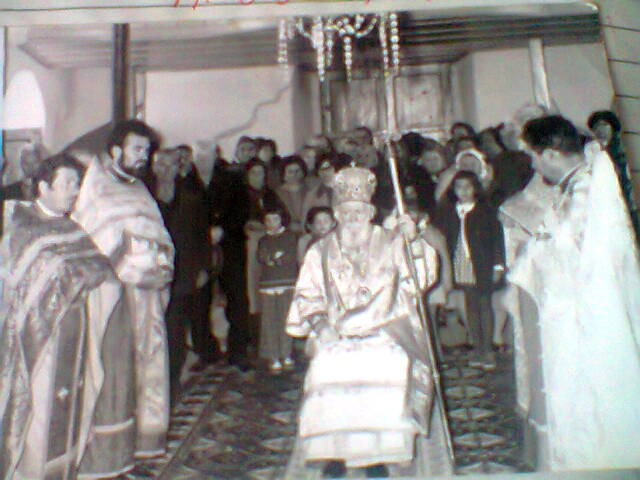 Архиерейска Света Литургия в храма на храмовия празник около 1980 с НВП Блаженнопочившия Сливенски митрополит Никодим